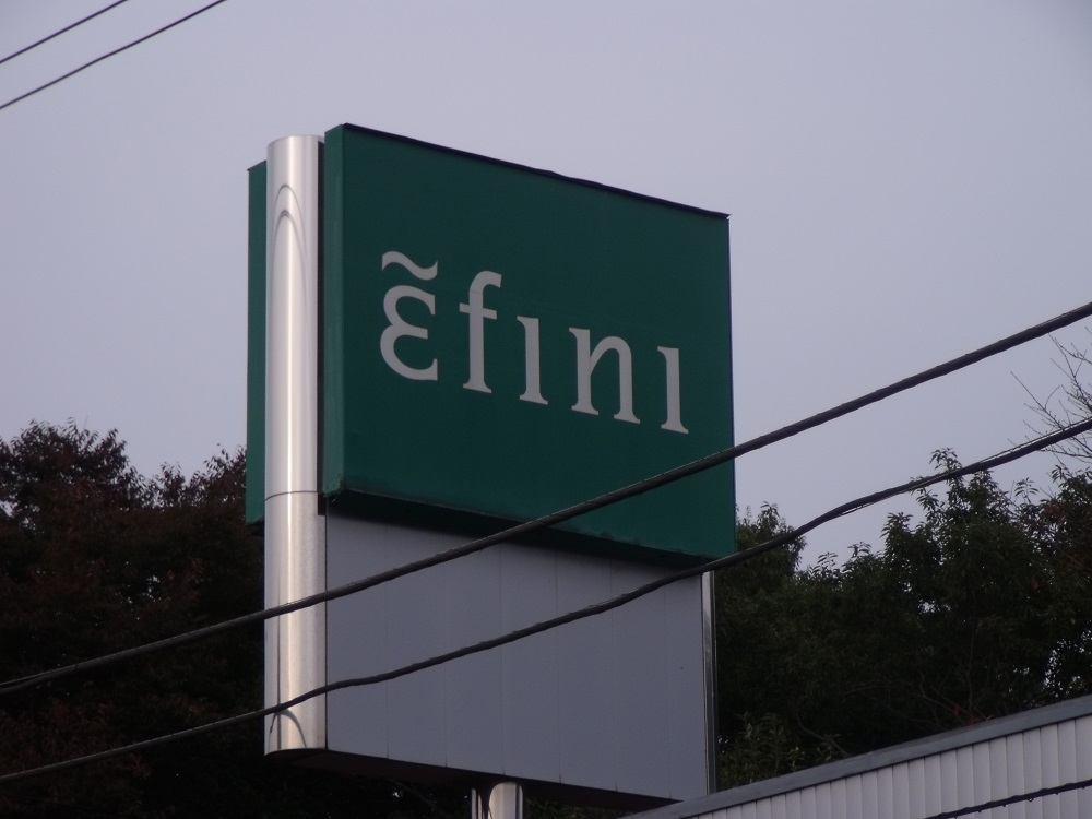 2010年撮影